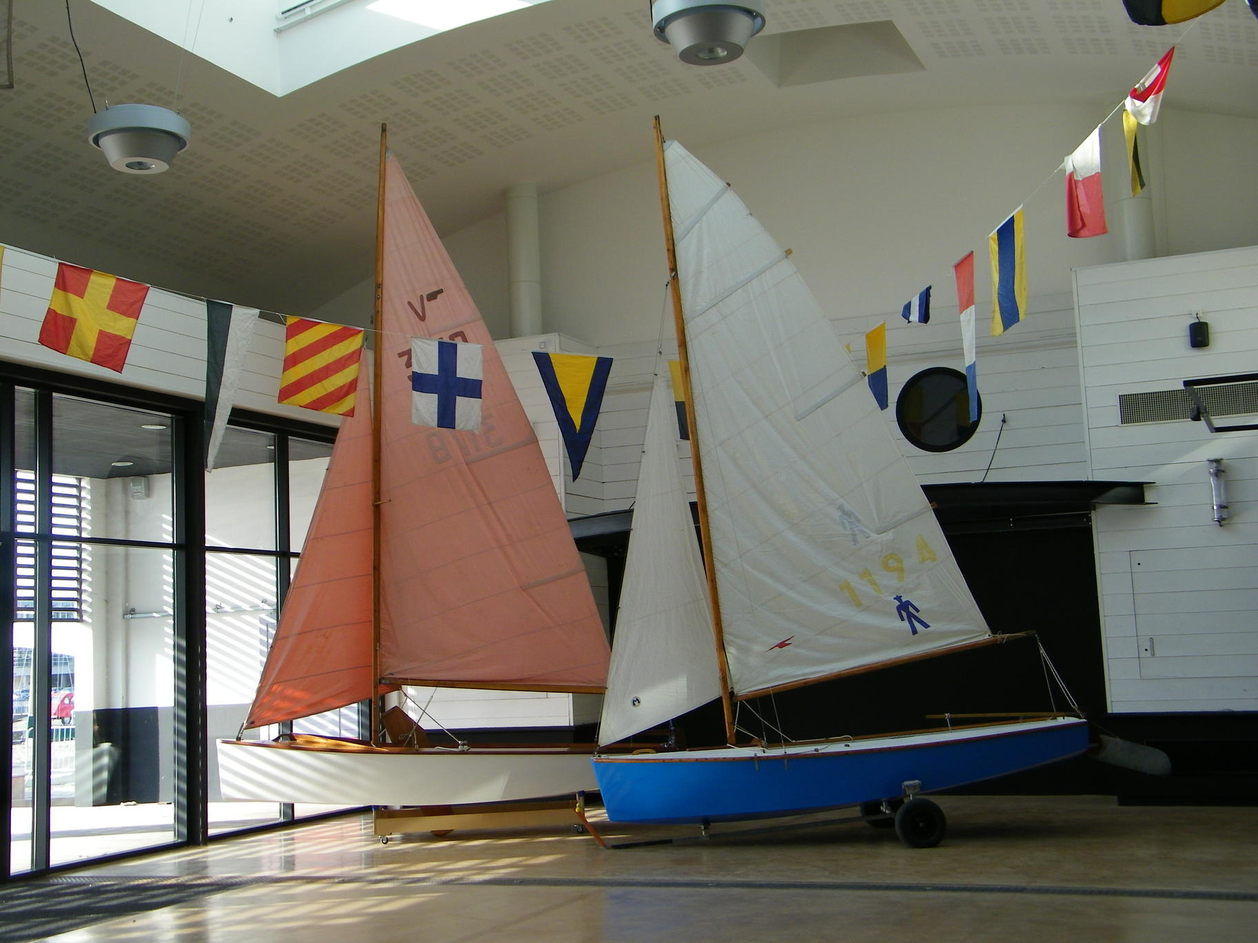 Bateaux de la Petite Plaisance exposés dans le hall de l'Encan : au premier plan un Mousse, au second plan un Vaurien